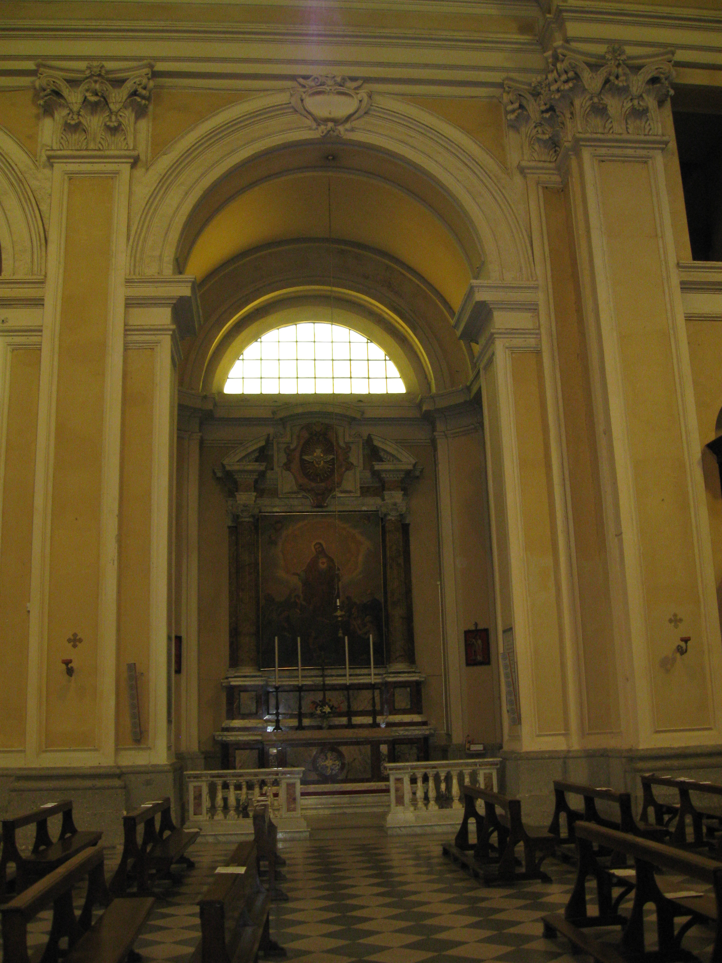 Altare del Sacro Cuore nella basilica di San Barnaba a Marino (RM)